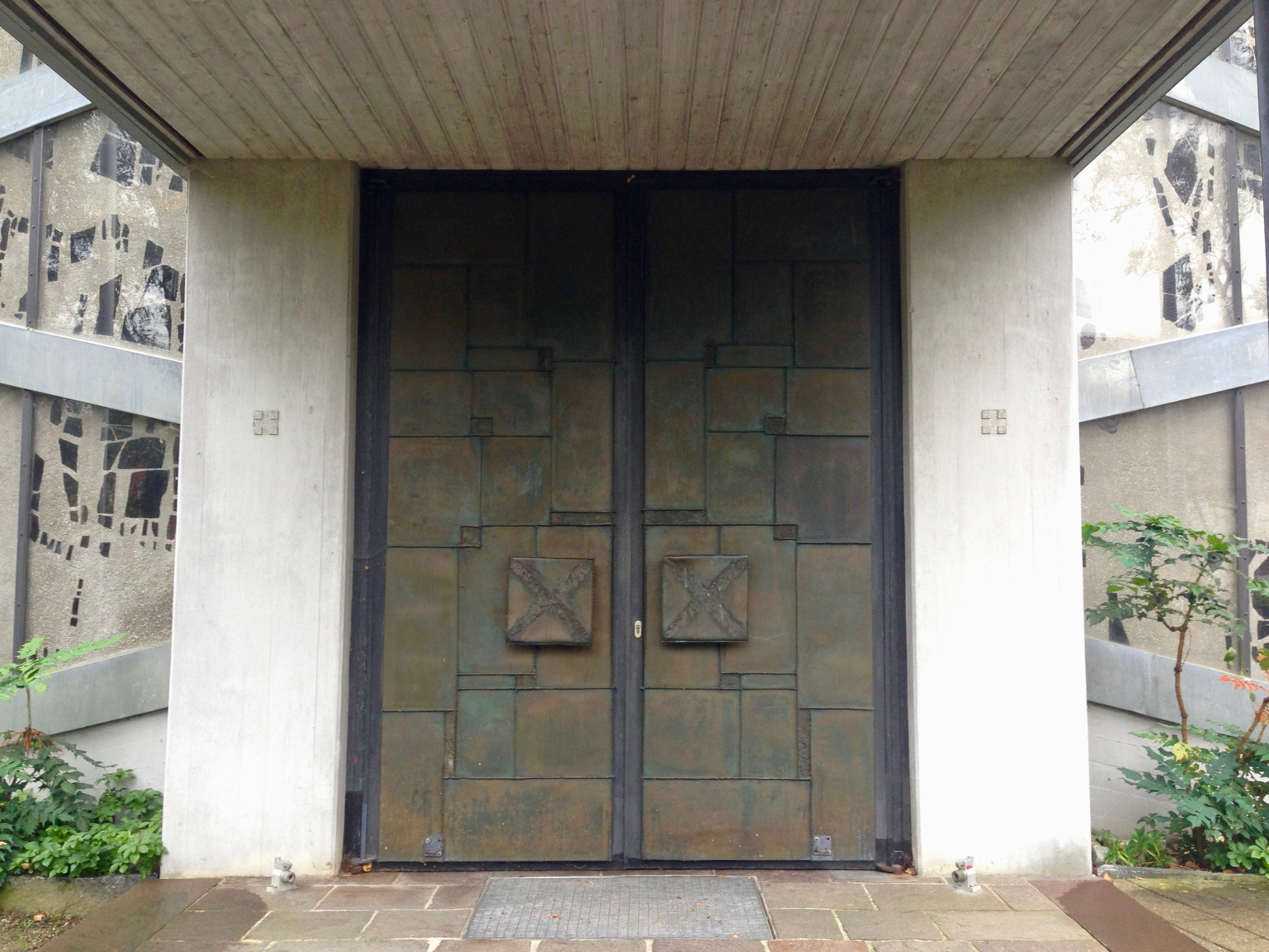 Die von Erich Walter Stadler geschaffene Flügeltüre an der Seite der Pfarrkirche St. Peter und Paul in Laimnau